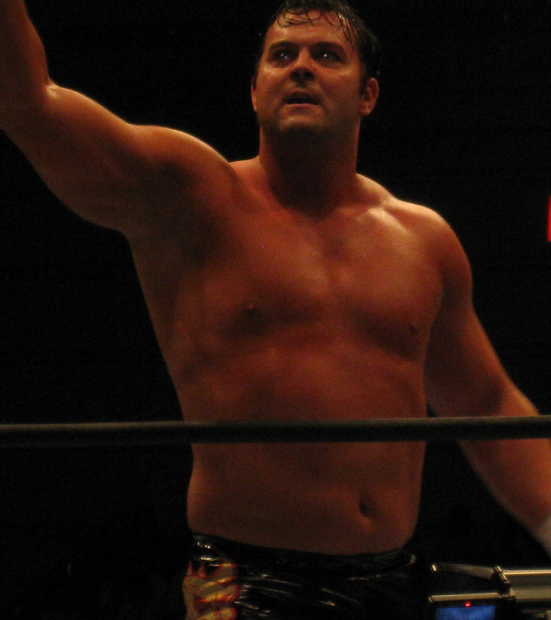 2014年6月21日 大阪府立体育会館 「DOMINION6.21」 デイビーボーイ・スミスJr.